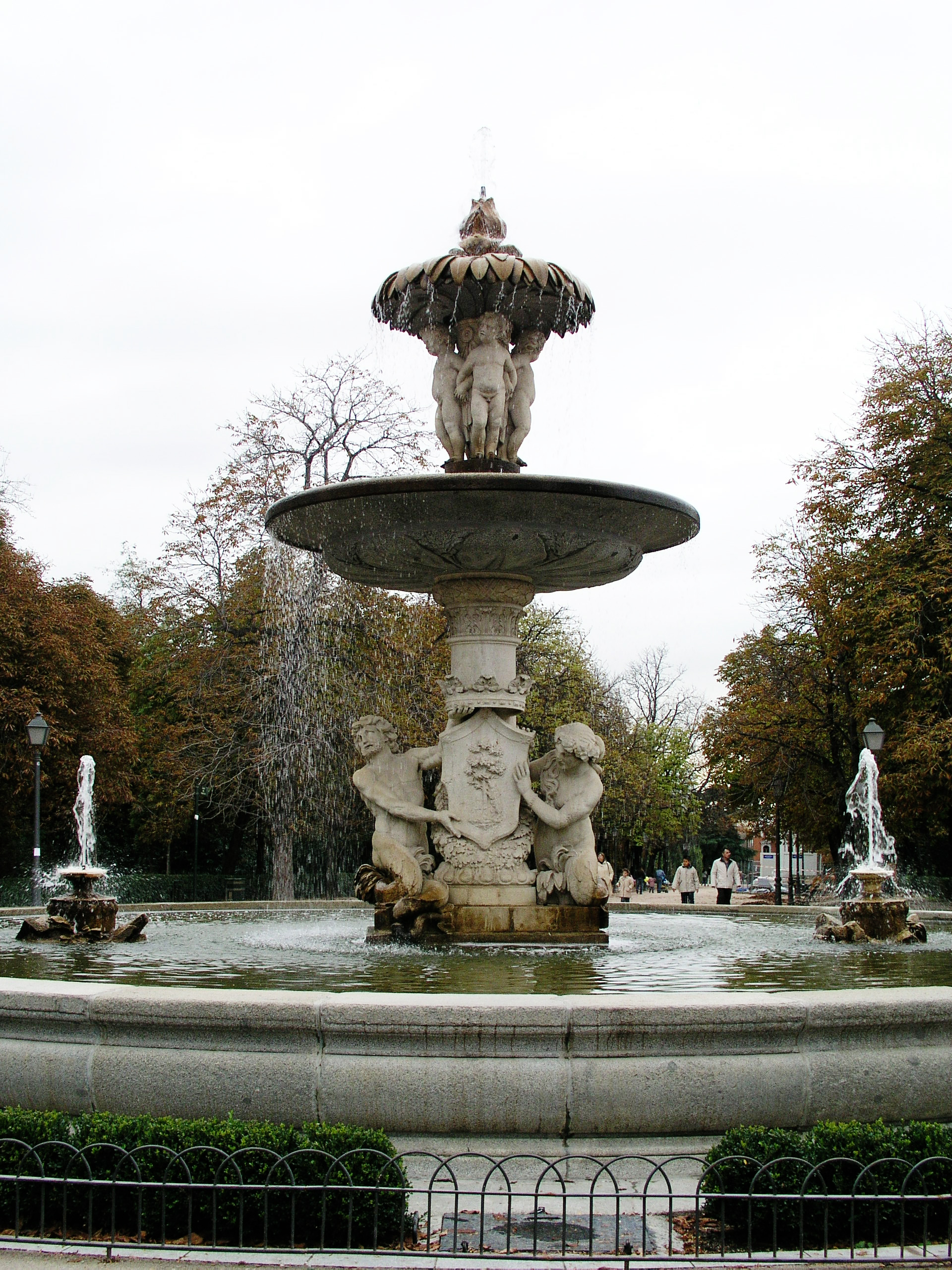 Jardines del Buen Retiro, Madrid, Spain. Fuente de Alcachofa